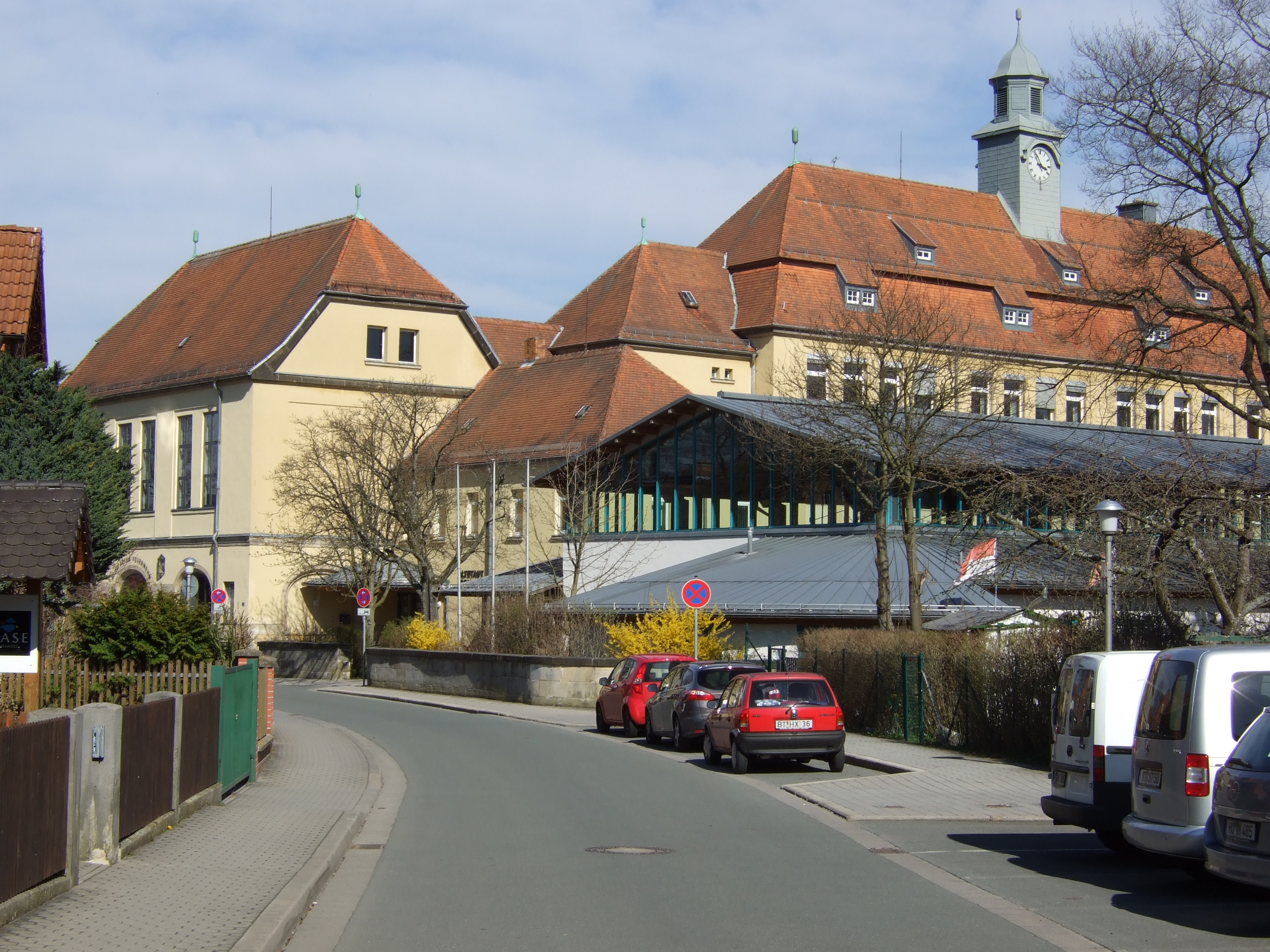 Mittelschule Bayreuth-Altstadt („Altstadtschule“, Fantaisiestr.11) und Feuerwehrhaus